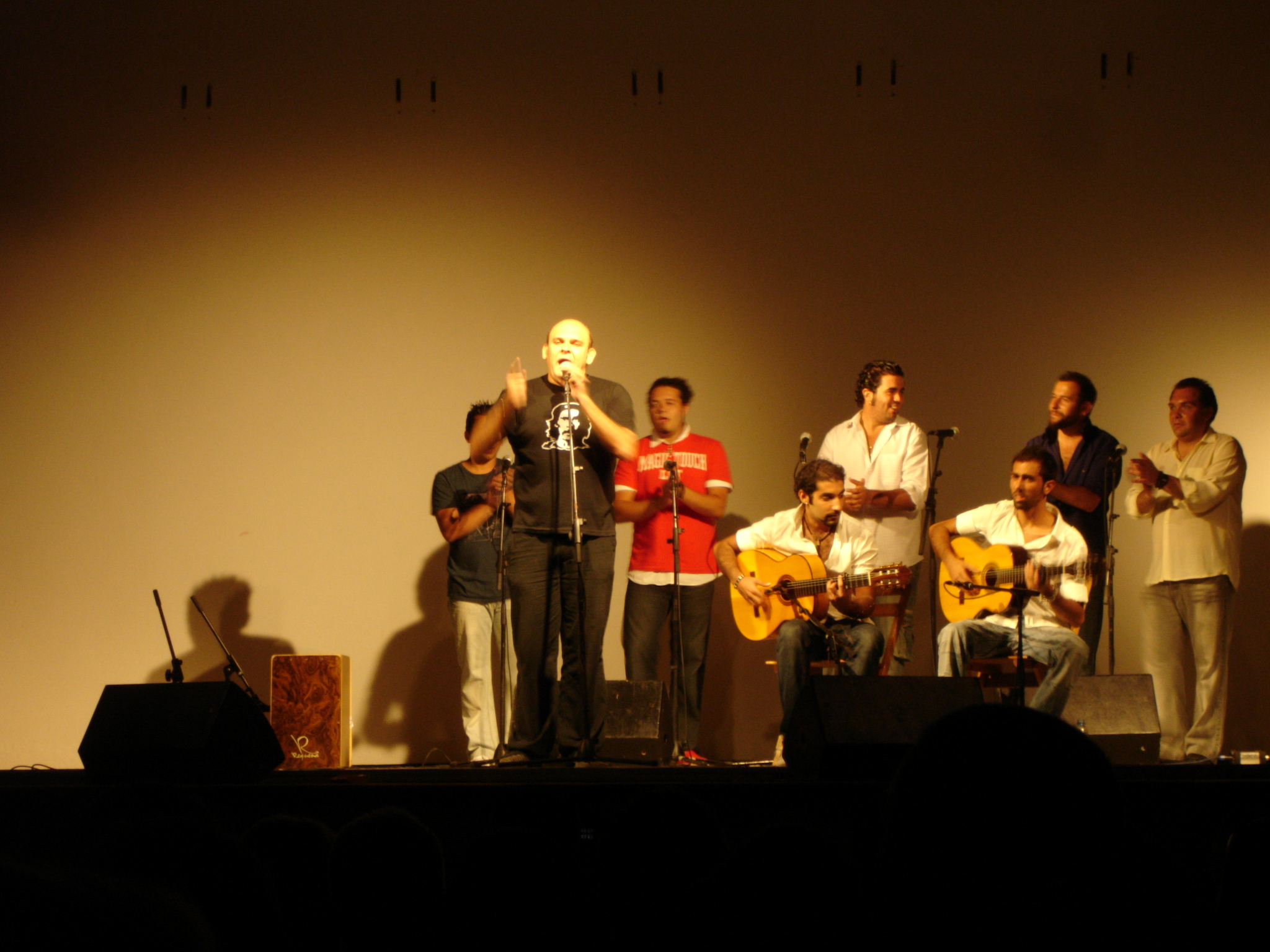 Luis Lara. Flamenco show in Jerez de la Frontera, Andalusia (Spain)